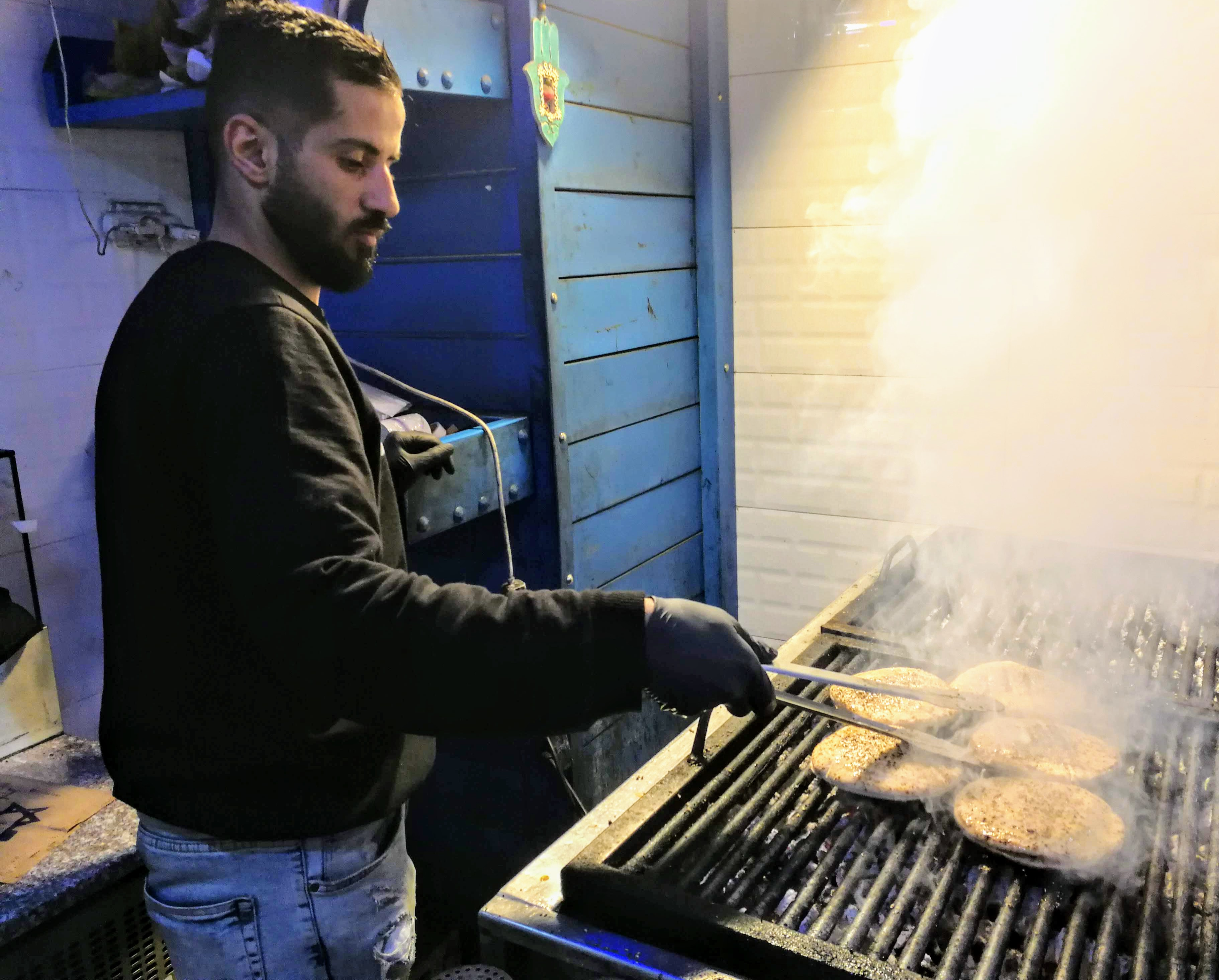 טבח במהלך הכנה של עראייס על הגריל, תל אביב